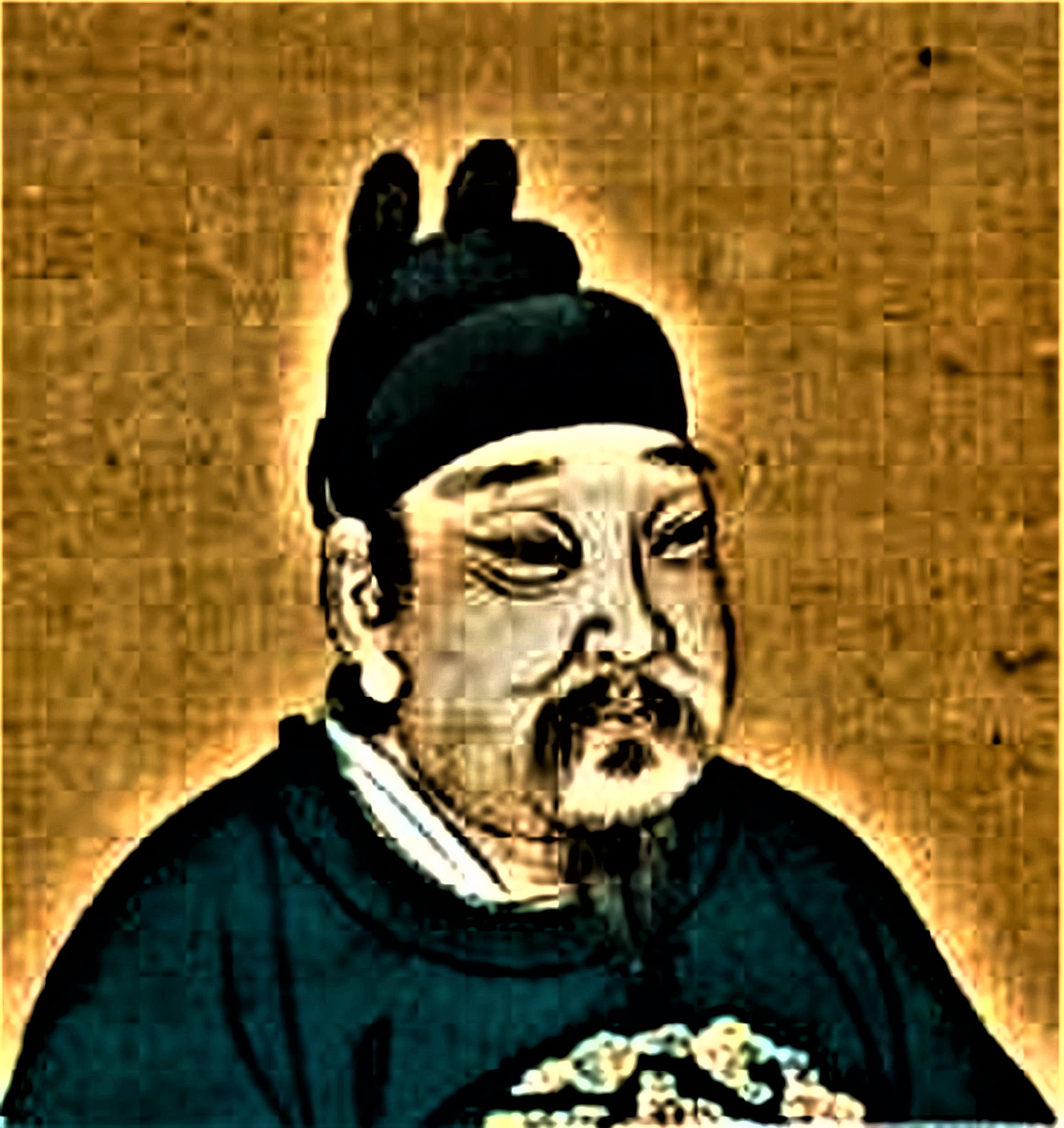 後周世宗柴榮